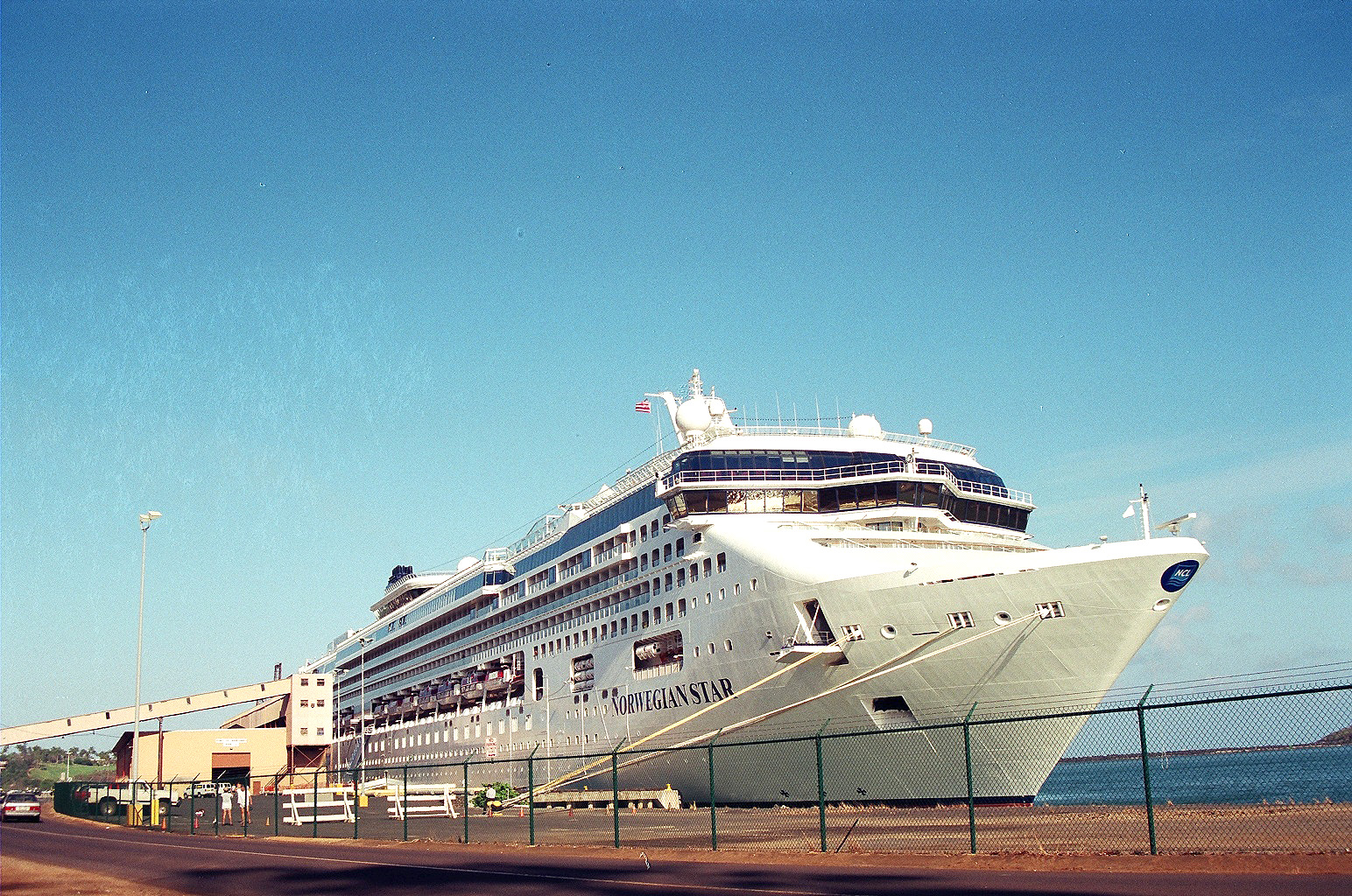 Norwegian Star Cruise docking in Kauai, 2002